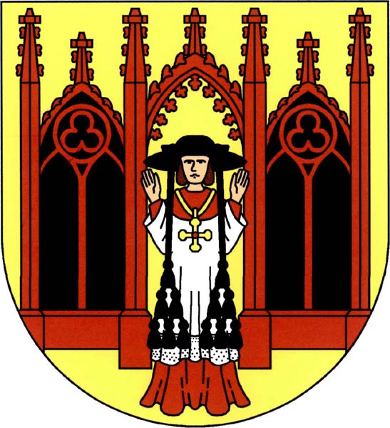 Znak obce Vroutek